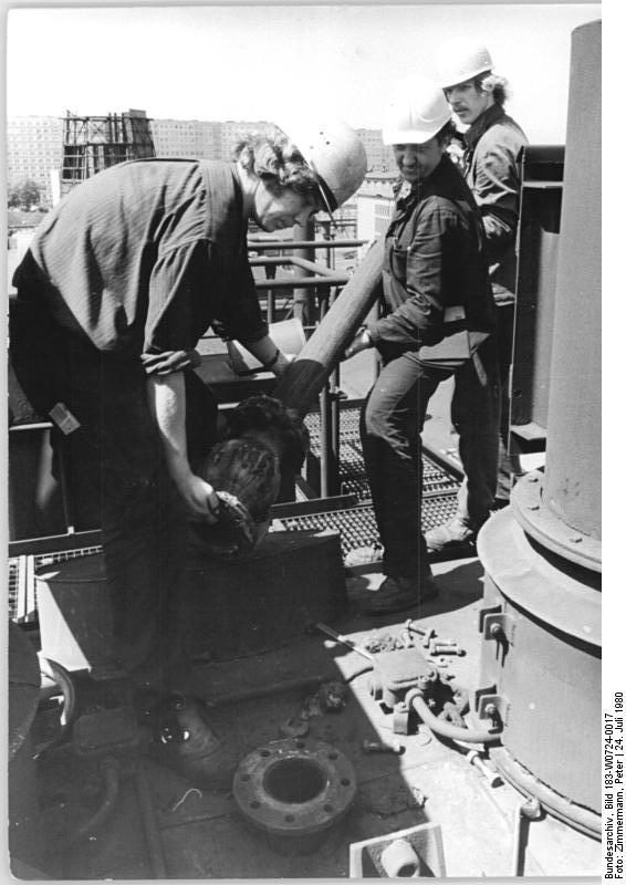 Berlin, Brigade "Ernst Reinke" ADN-ZB Zimmermann 24.7.1980 Wettbewerb Berlin: Sechs Monate Garantie werden die Mitglieder der Brigade "Ernst Reinke" -hier Manfred Giebel, Brigadier Otto Nordau und Michael Piur (vlnrI) - für die Reparatur dieser Filteranlage im VEB EKL Berlin geben. Durch Schulung besonders der jungen Brigademitglieder an Schwerpunktaggregaten des Betriebes will das Kollektiv zur weiteren Erhöhung der Verfügbarkeit der Maschinen und Anlagen beitragen. -siehe auch W0824-16N